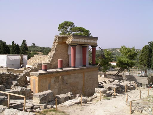 Zříceniny chrámu v Knóssu.